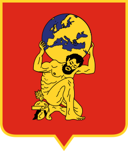 Distintivo del Comando delle Forze Operative Terrestri di Supporto.